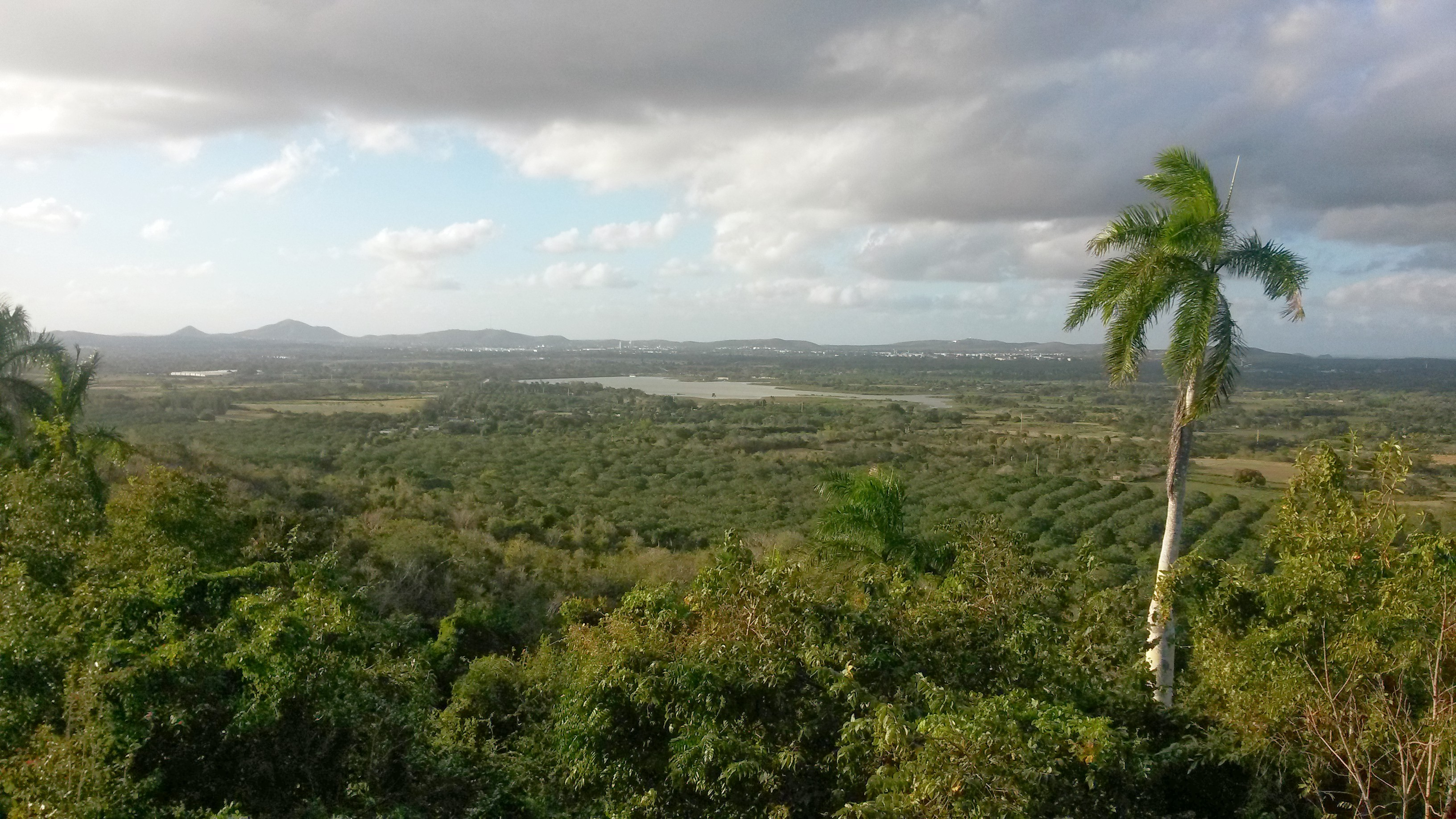 Holguín, Cuba